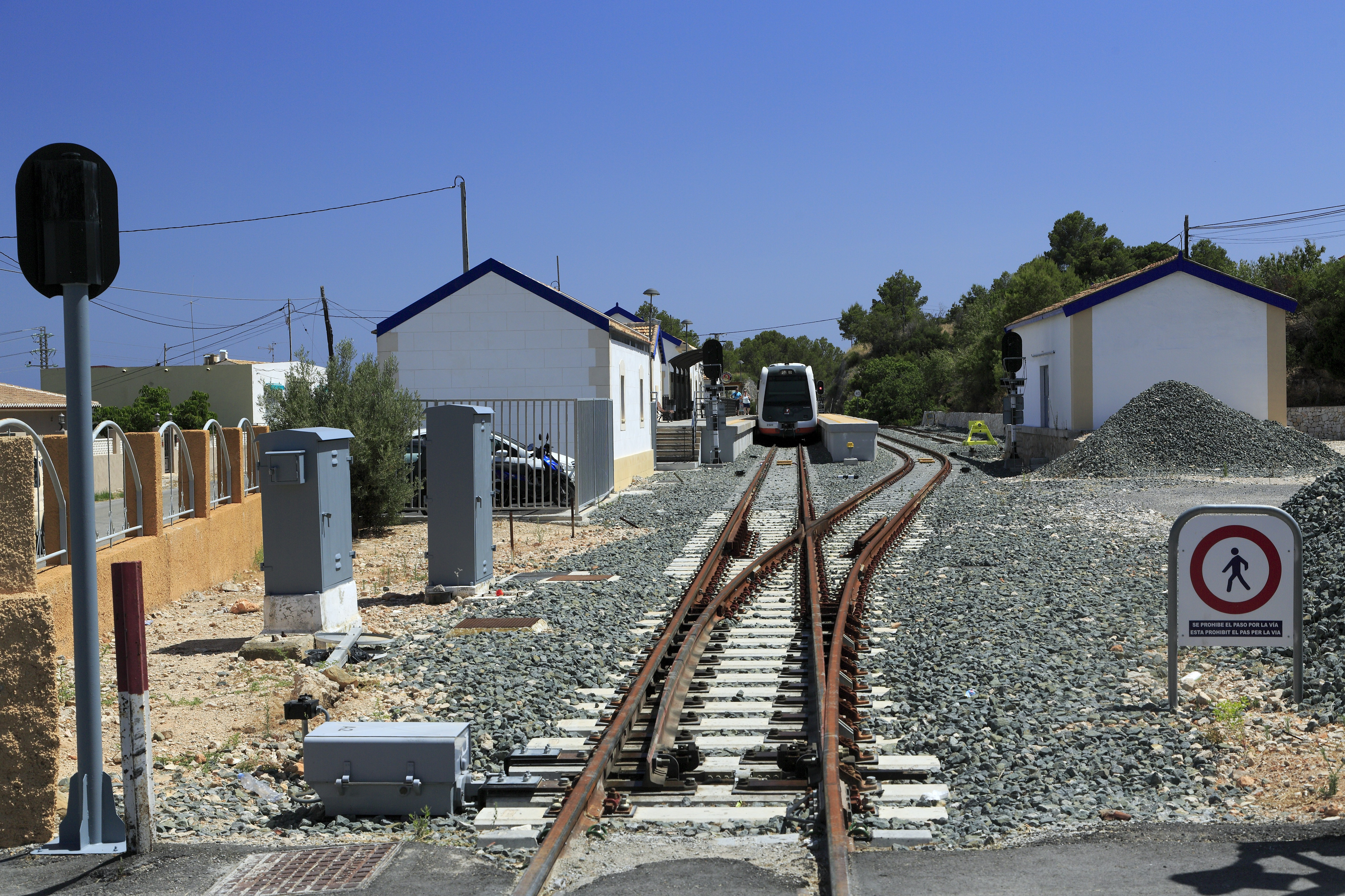 Aus Richtung Dénia, die Strecke ist, an den rostigen Fahrflächen gut sichtbar, seit August 2016 außer Betrieb.